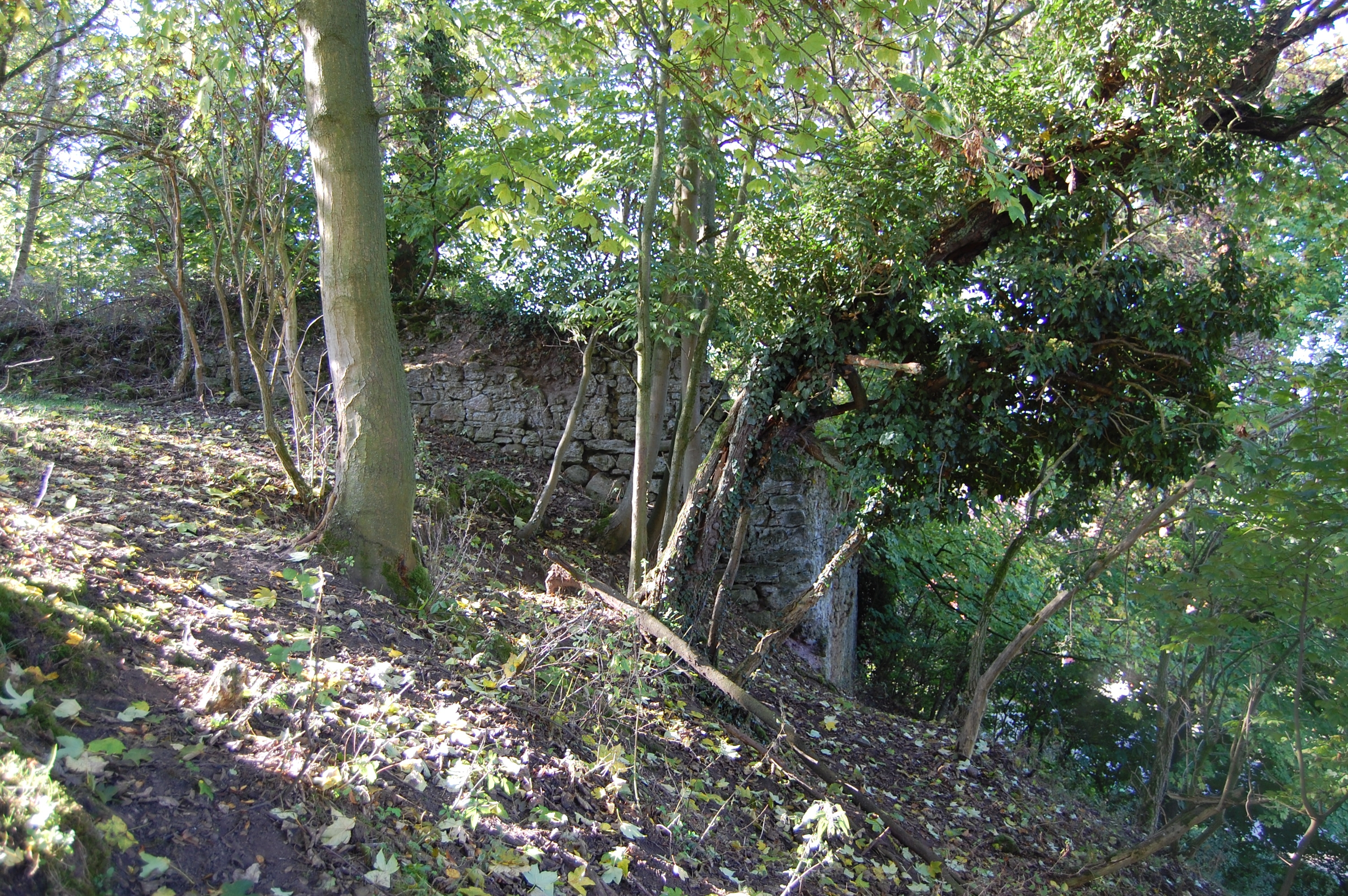 Burgruine Rückerode, Mauerreste. Blick nach Südwesten